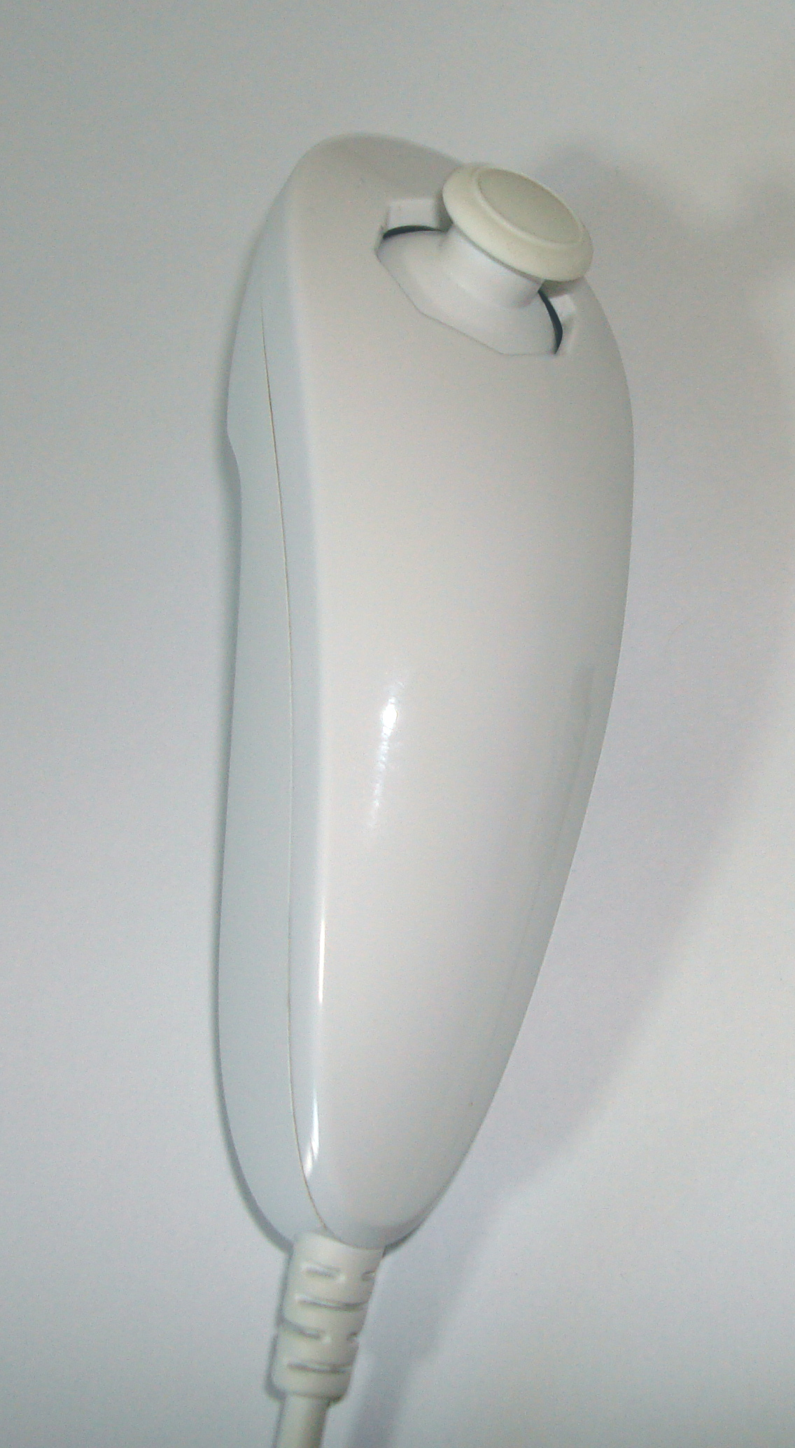 Wii Nunchuk controller